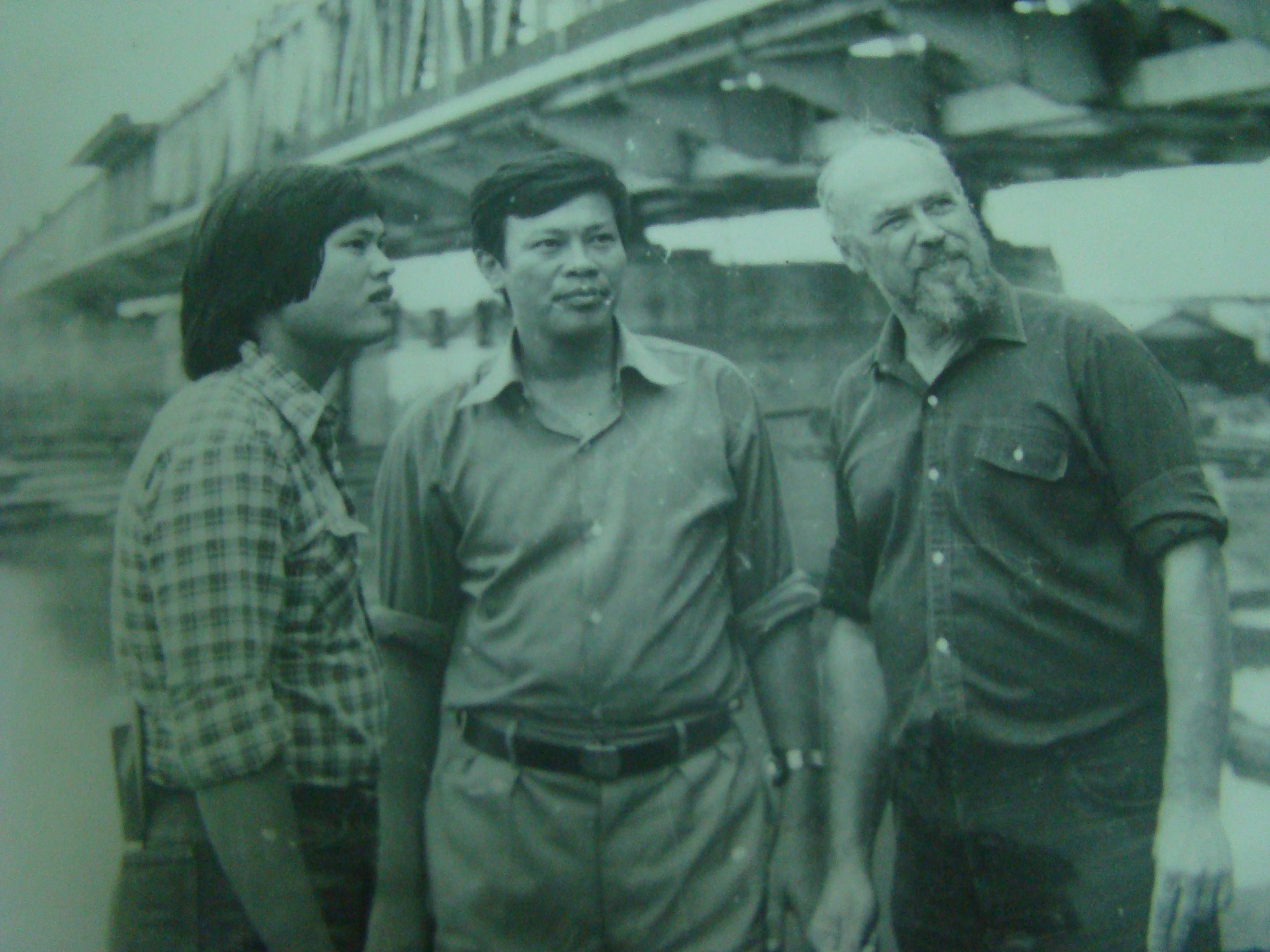 Ảnh chụp sau khi lắp xong dầm thép tháng 10/1983